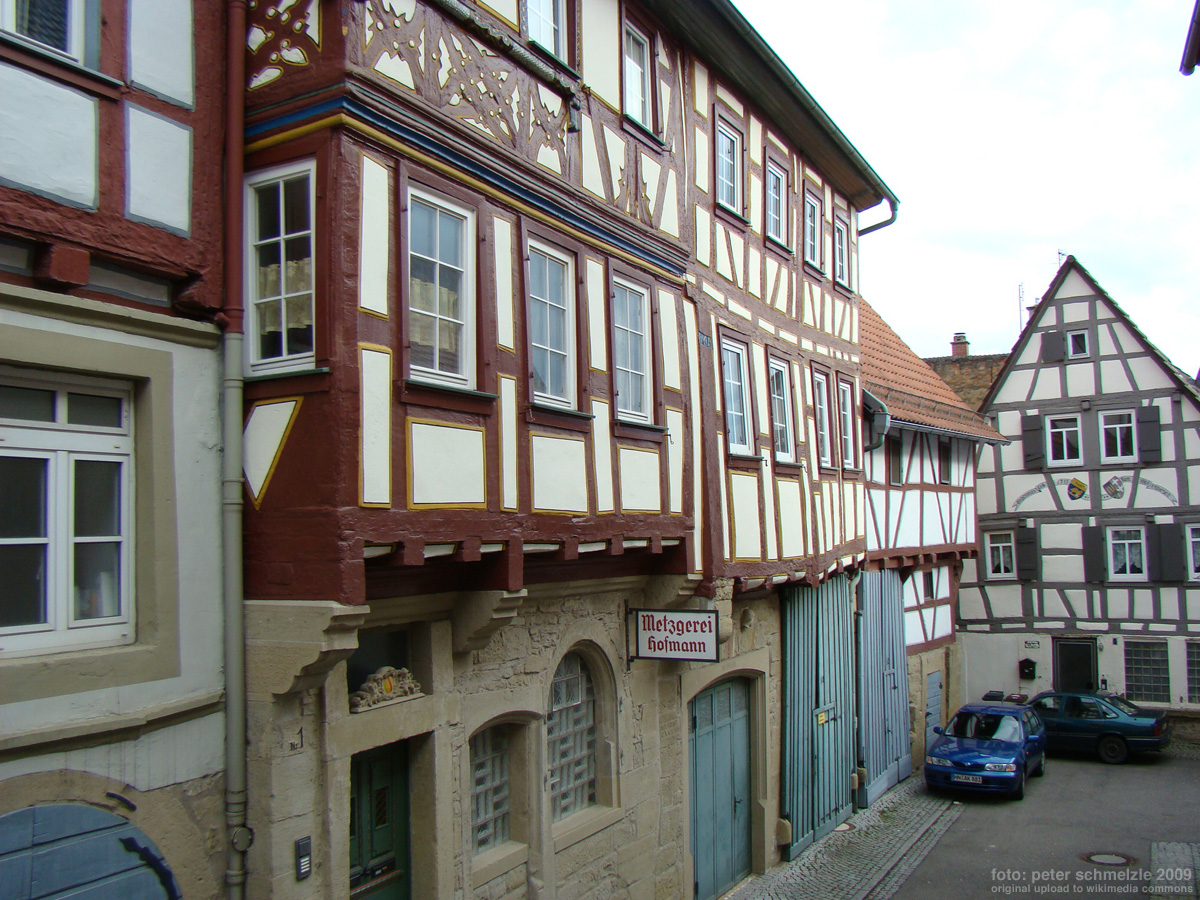 Historisches Gebäude Metzgergasse 1 in Eppingen